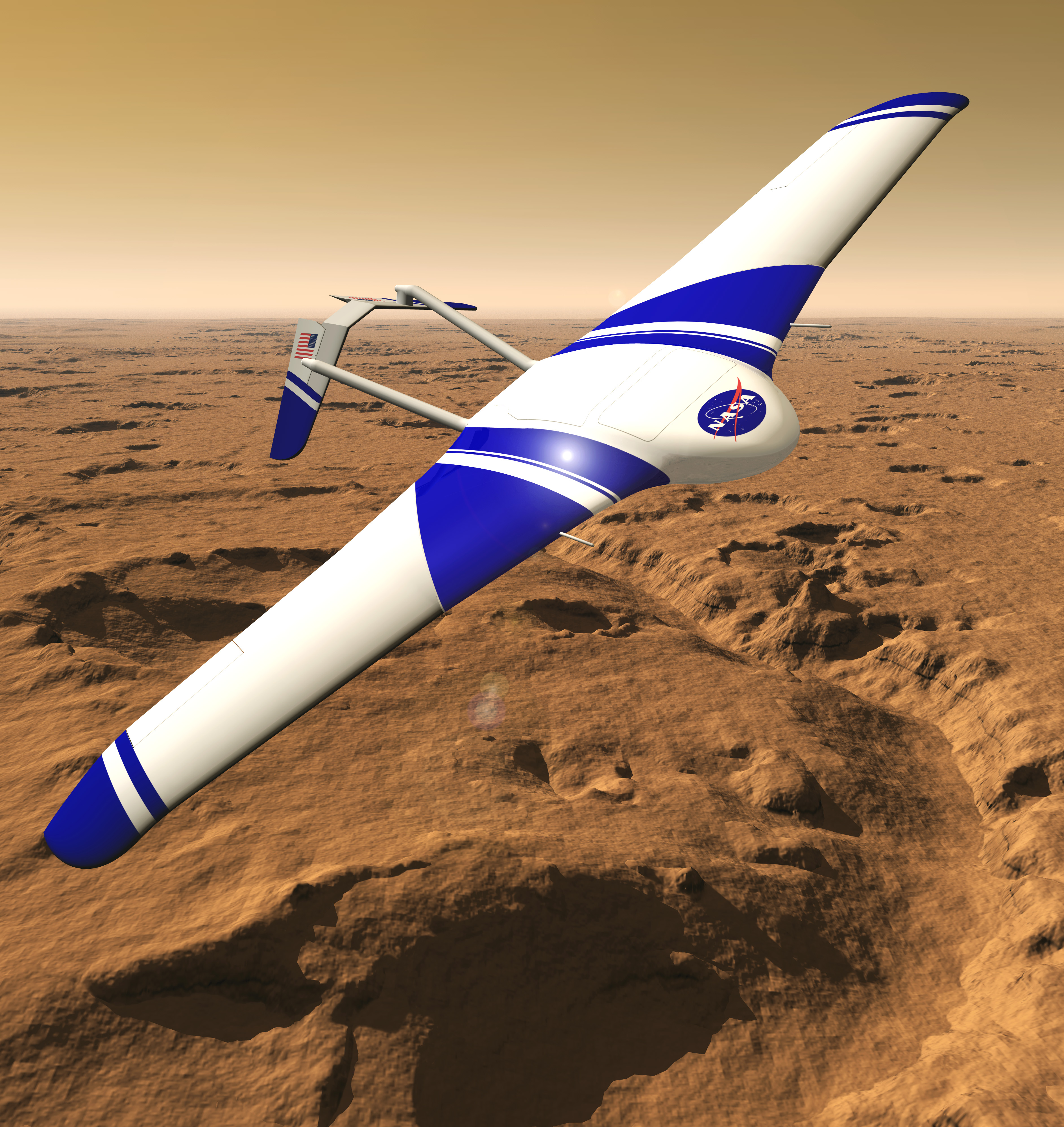 ARES soaring over Mars.